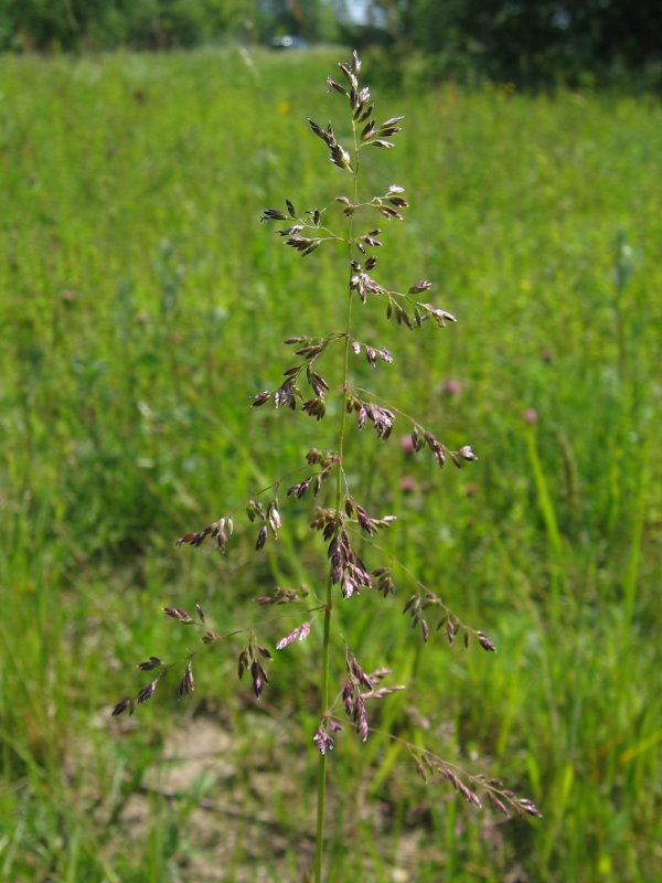 Wiesen-Rispengras Poa pratensis, Stoltera Nähe Rostock